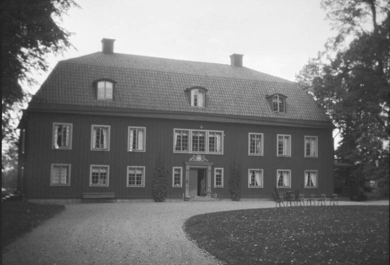 Motiv: Olivehult Kategori: HerrgårdOlivehult